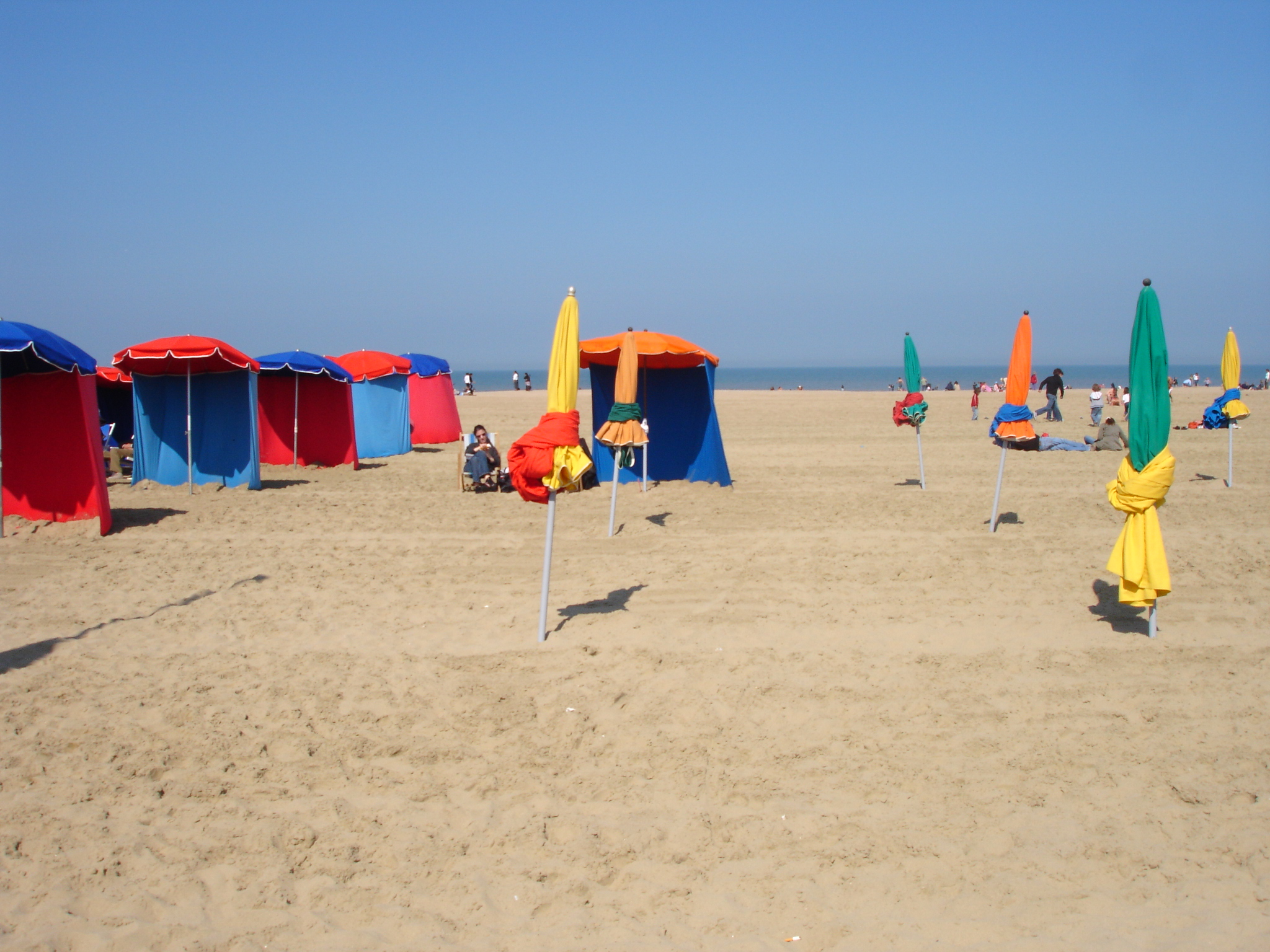 France, Calvados (14) , Deauville, plage